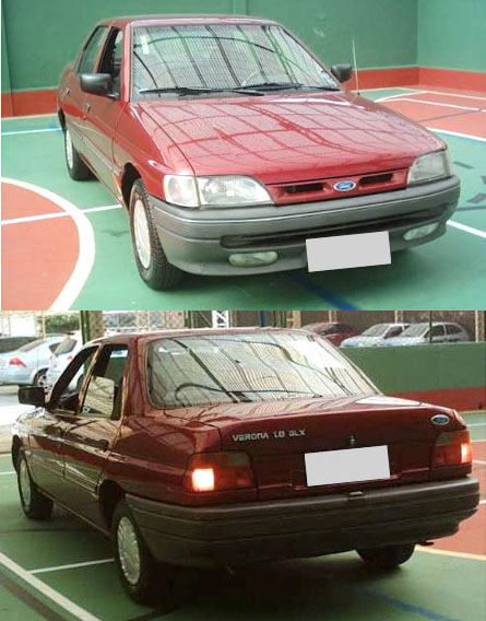 Colagem com imagens frontal e traseira de um Ford Verona - segunda geração - em bom estado de conservação.